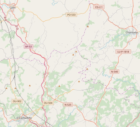 Zona de Galicia na que se poden situar os relatos de "O tempo escuro"-Valdelama, de Modesto Hermida